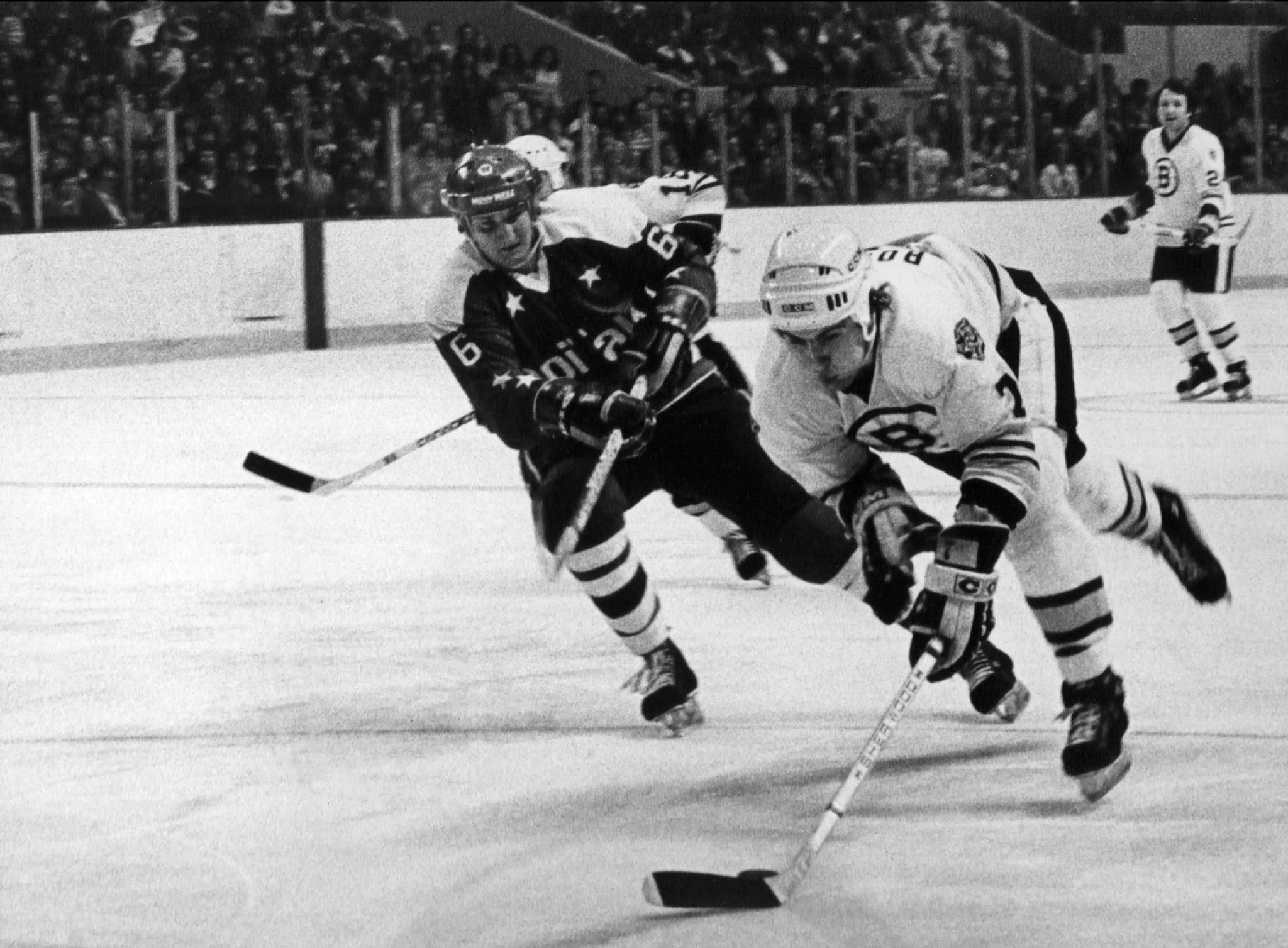 [Raymond Bourque Boston Bruins Defenseman 1979]